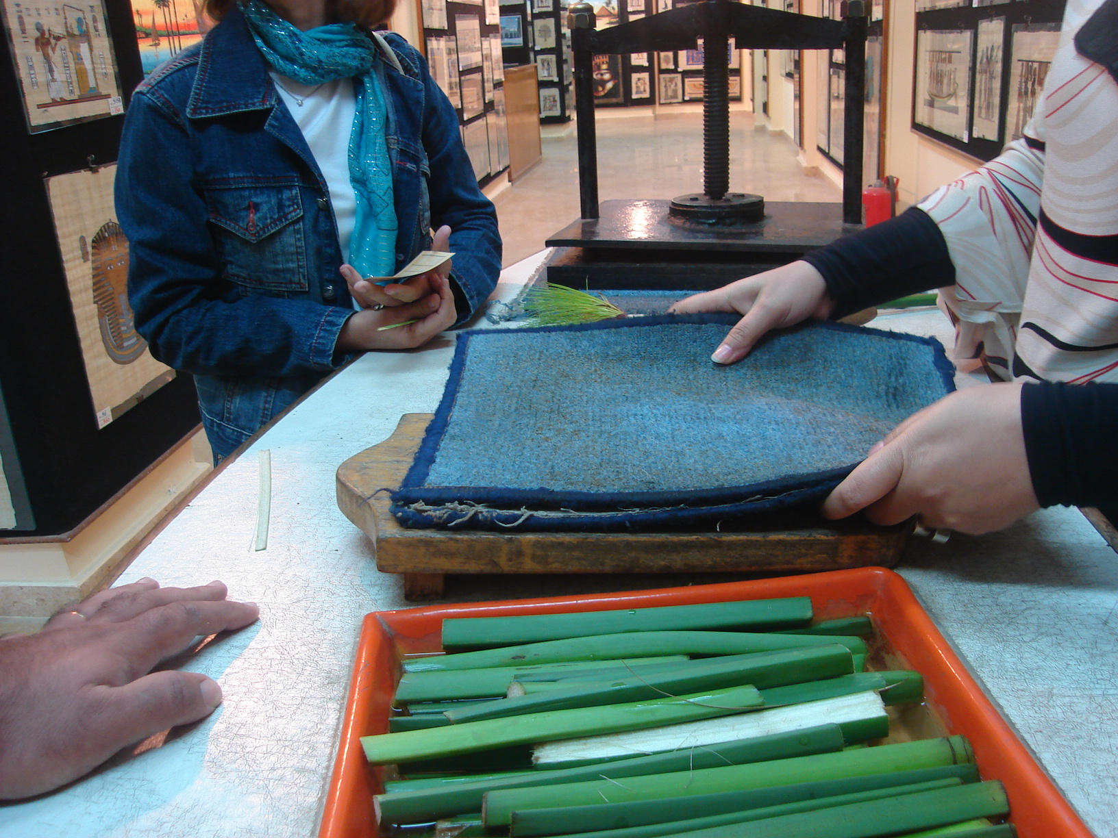 Confecção de papiros